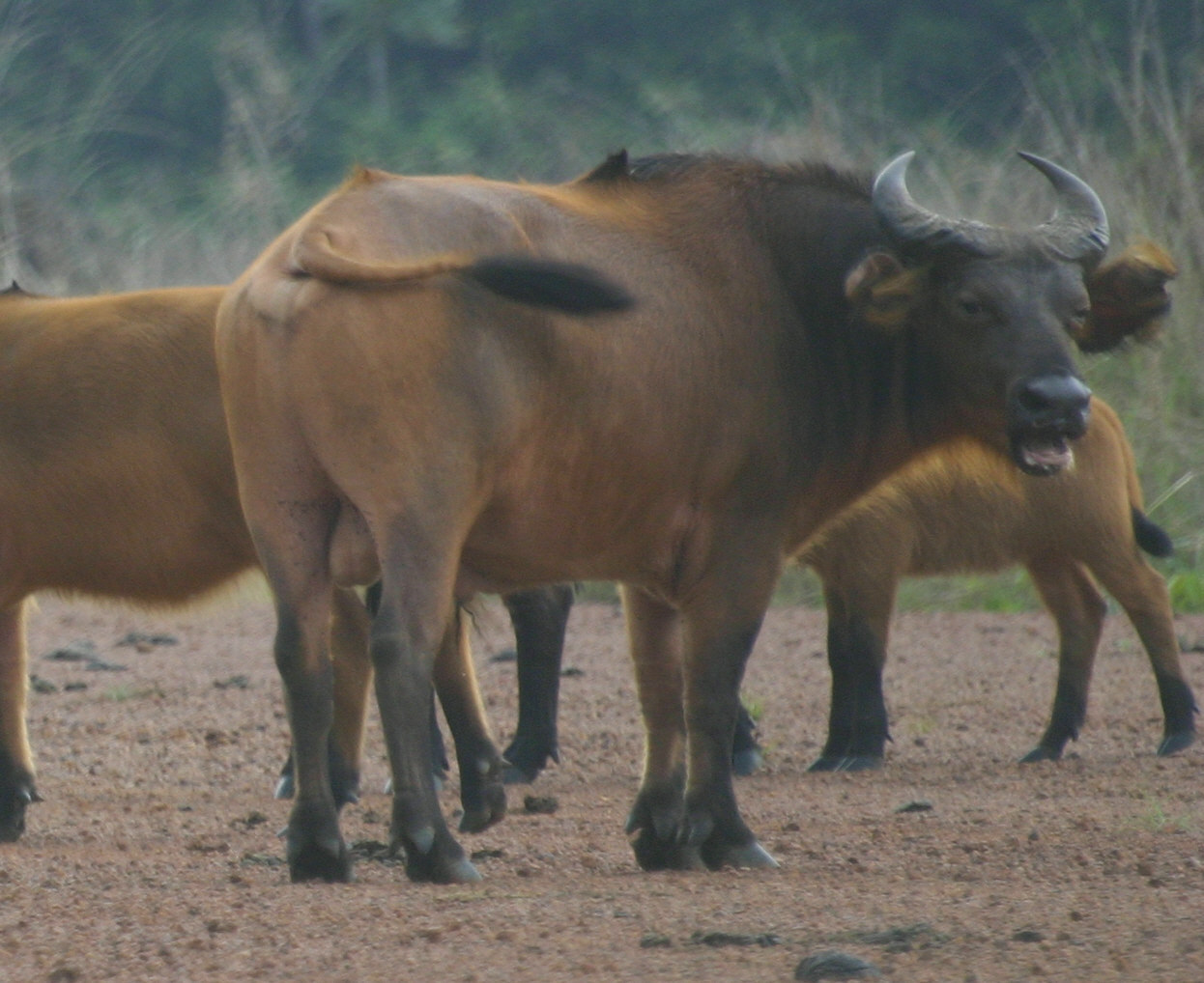 Troupeau de buffles très abondant dans le Parc National de Lobéké au Sud-Est du Cameroun